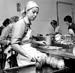 Bild av en sillkonservering, tidigt 1900-tal. This Swedish photograph is free to use under one of the following cases: For photographic works (fotografiska verk), the image is in the public domain: a) if the photographer died before January 1, 1944, or b) if the photographer is not known, and cannot be traced, and the image was created before January 1, 1944. For photographic pictures (fotografiska bilder), such as images by the press, the image is in the public domain if created before January 1, 1969 (transitional regulations 1994). The photographer, if known, should always be attributed. Always provide source information.